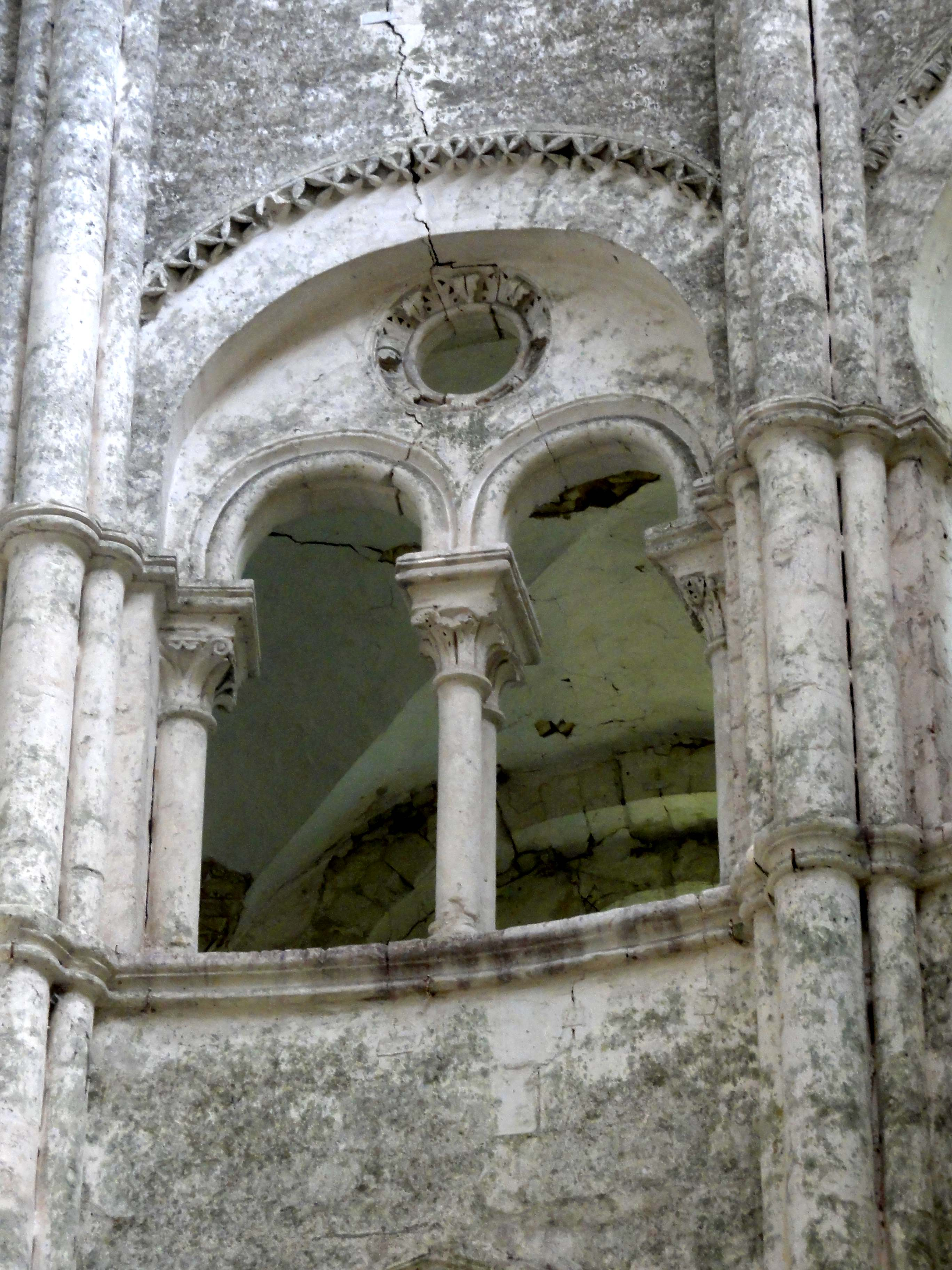 Chœur de l'abbatiale - voir le titre du fichier.